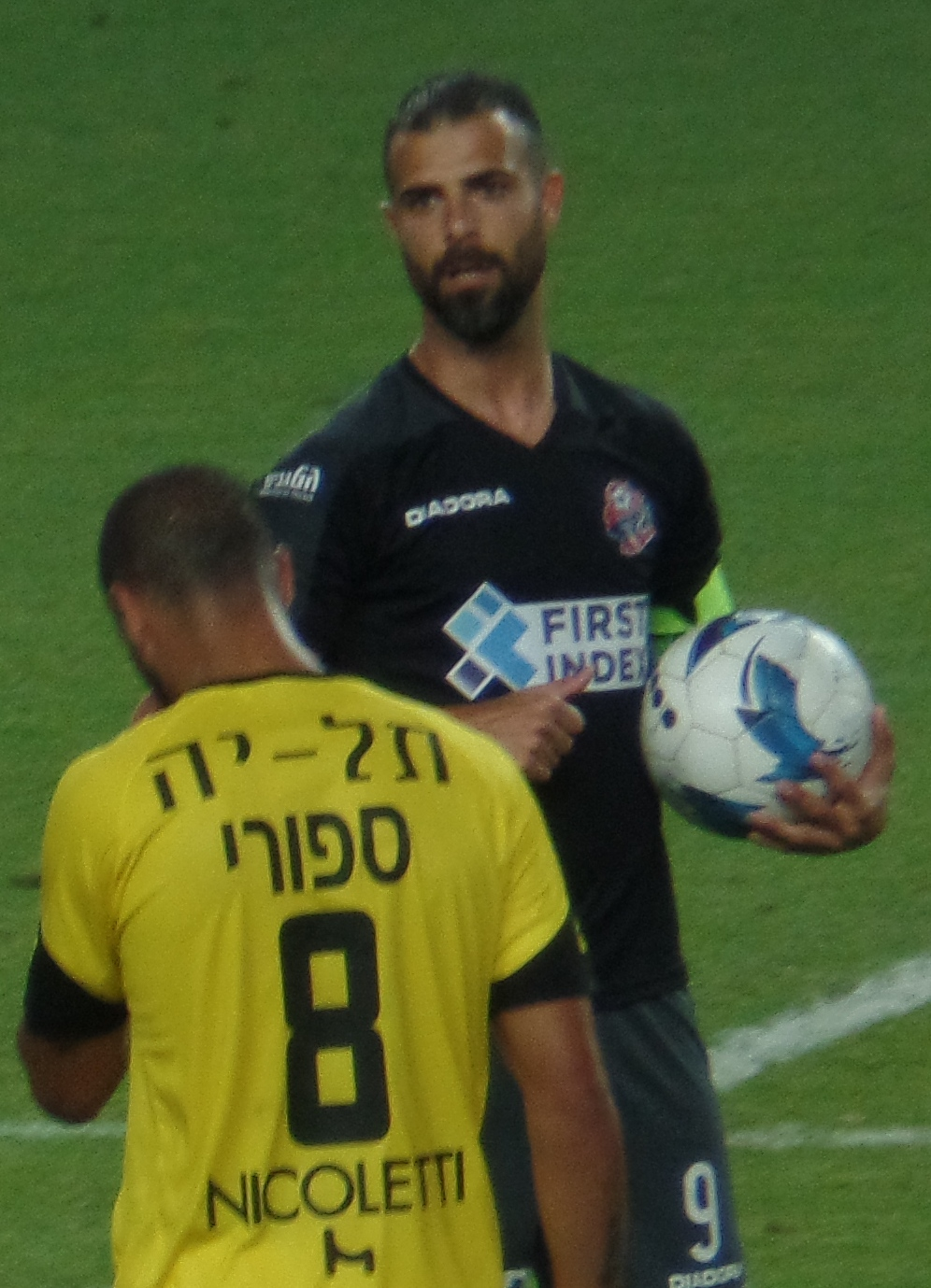 עדן בן בסט, 2018